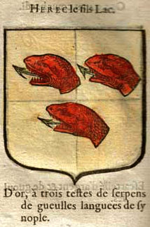 Hérec